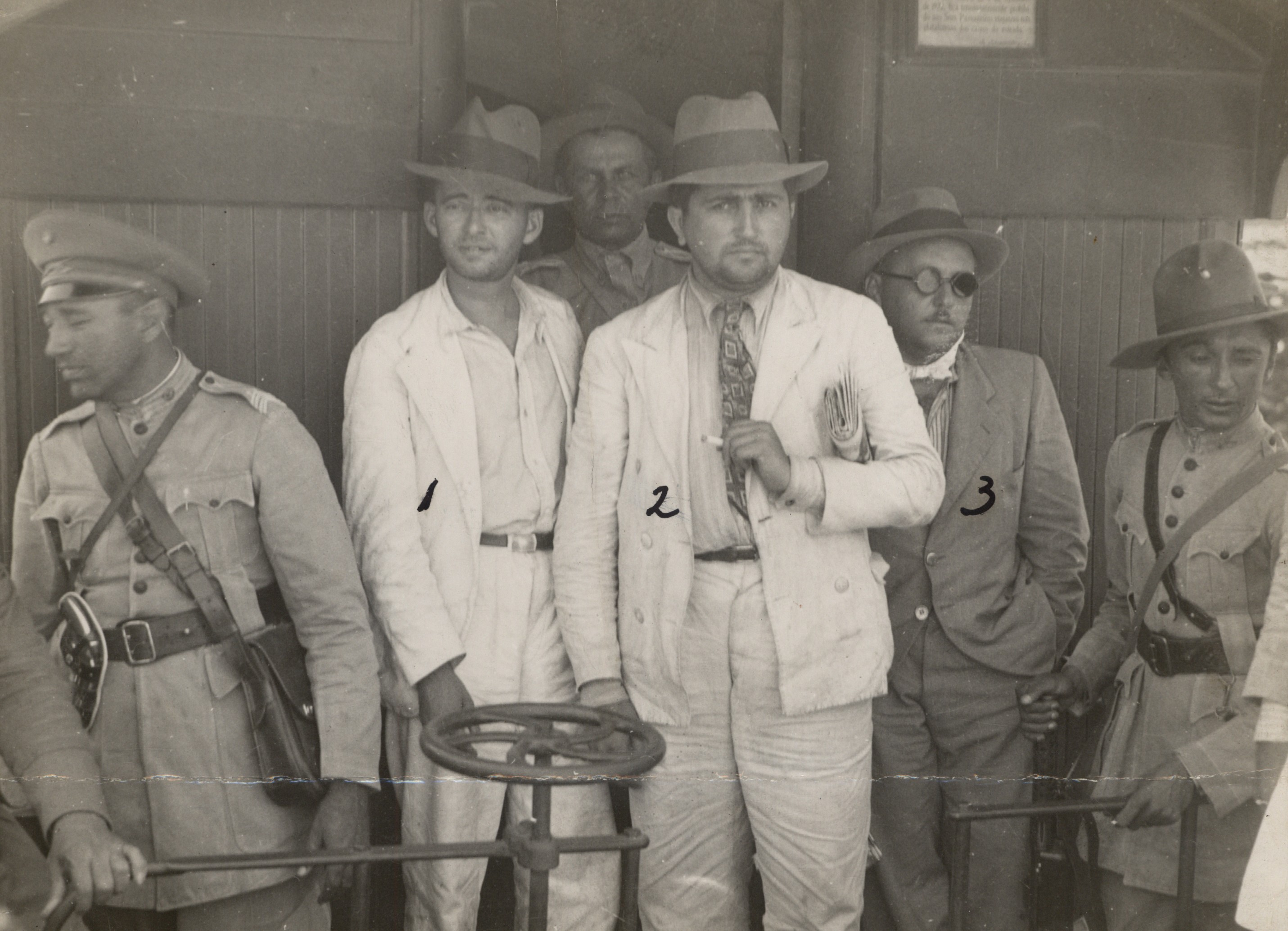 Imagem do Fundo Correio da Manhã.